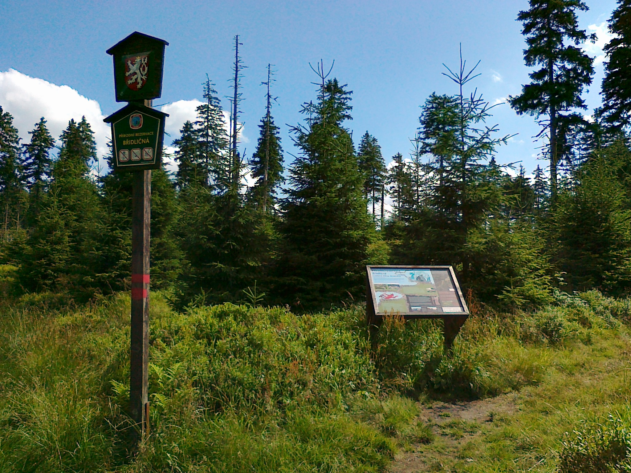 Tablice informacyjne przy wejściu do rezerwatu przyrody Břidličná (skrzyżowanie U Franiškovy myslivny)